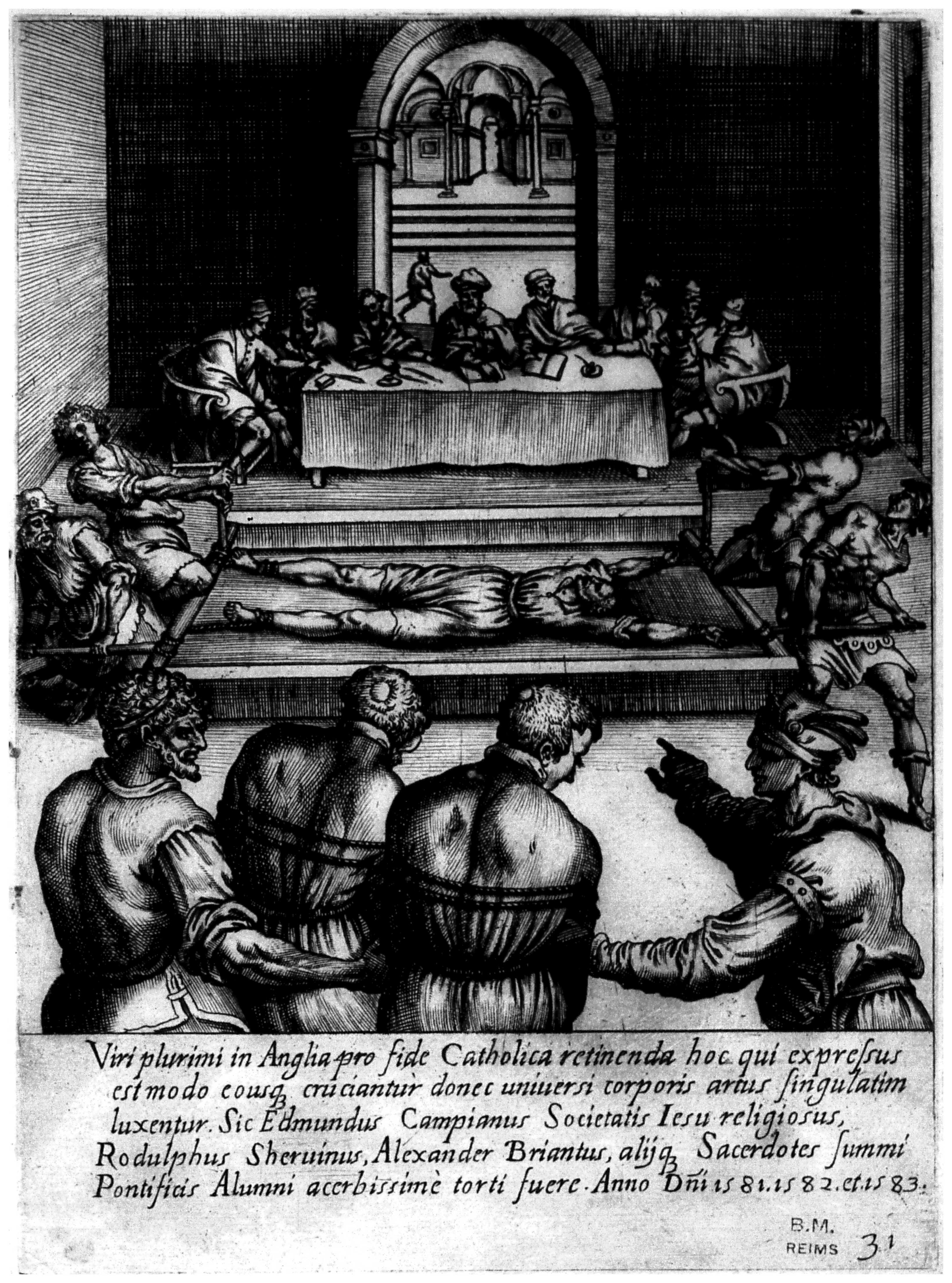 issu du microfilm 87 de la bibliothèque de Reims.